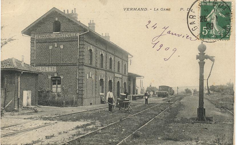 La gare de Vermand en 1909.